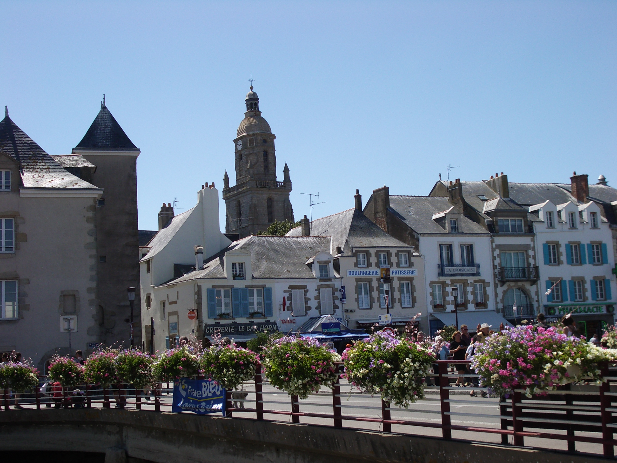 Clocher du Croisic, vue du port, département de Loire-Atlantique, France ; voir aussi Maps of France.